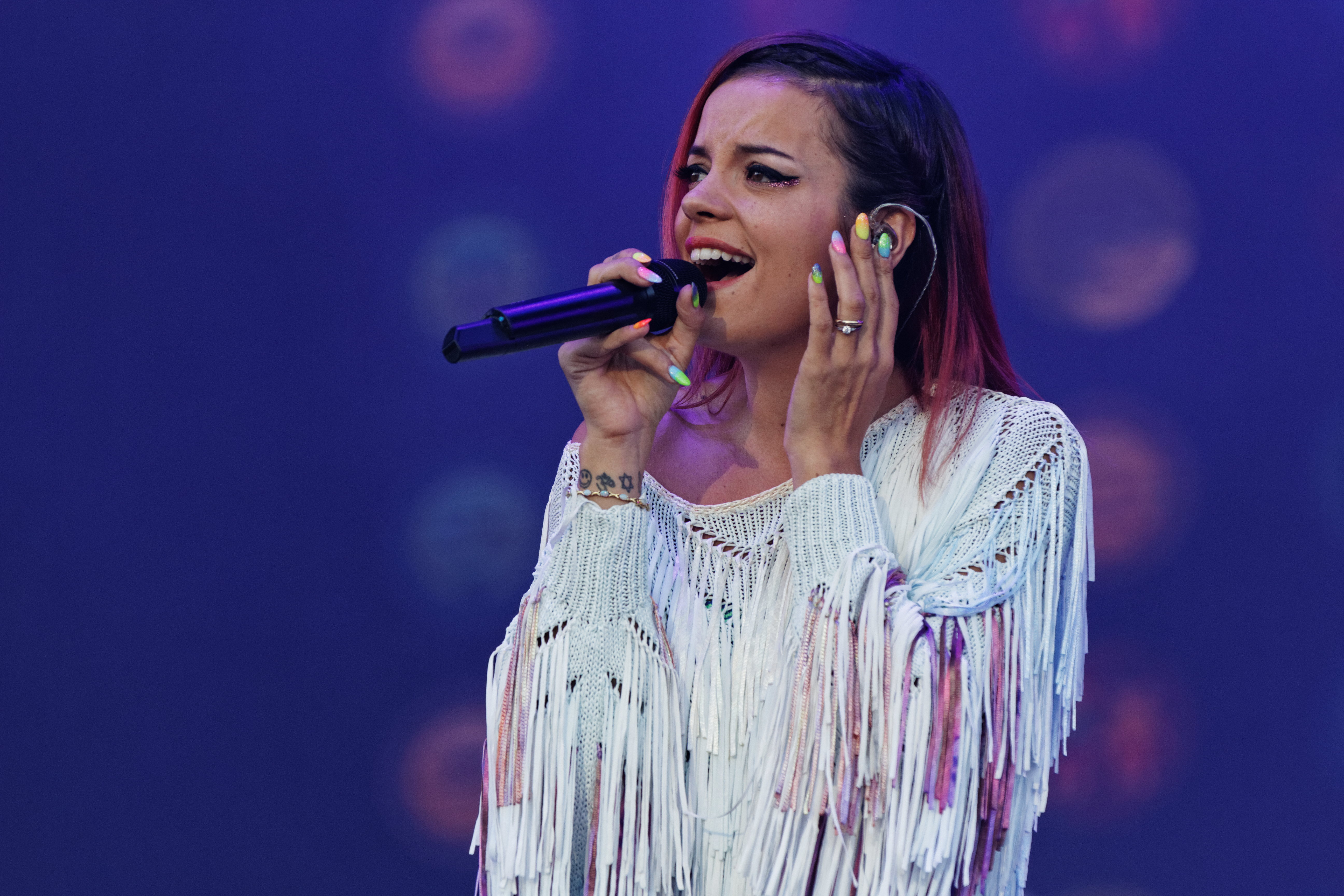 Lily Allen en concert sur la scène Glenmor lors du festival des Vieilles Charrues 2014.